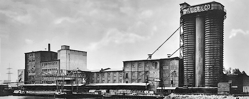 Betriebsgelände und -einrichtungen des Mühlenunternehmens Müller's Mühle GmbH bzw. damals Müller & Co. in Gelsenkirchen-Schalke, Am Stadthafen 42, in Nordrhein-Westfalen (Deutschland). Blick vom Gelsenkirchener Stadthafen; rechts befindet sich der Getreidesilo von 1949.